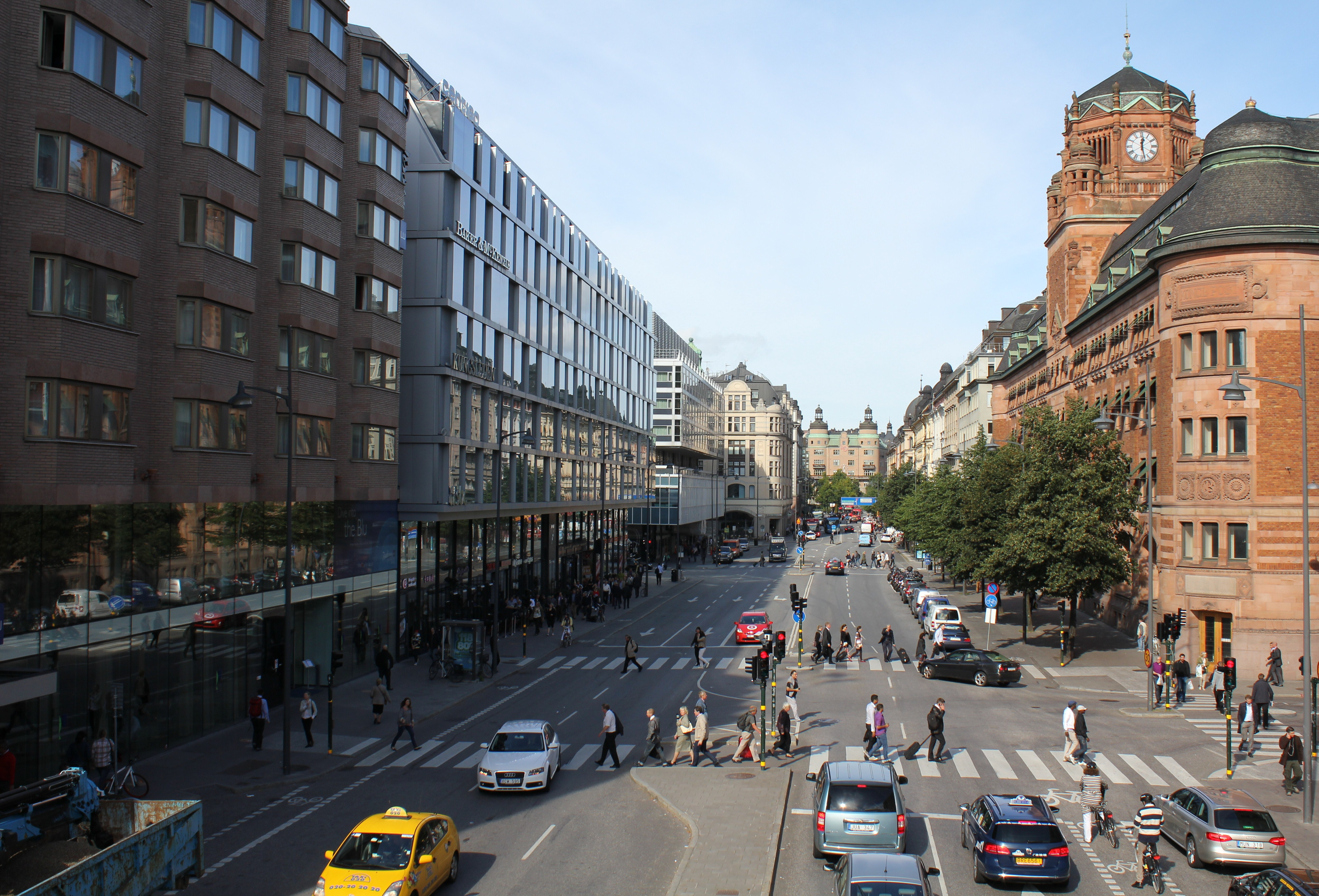 Vasagatan i Stockholm. Vy norrut från Klarabergsgatan. Till höger Centralposthuset.